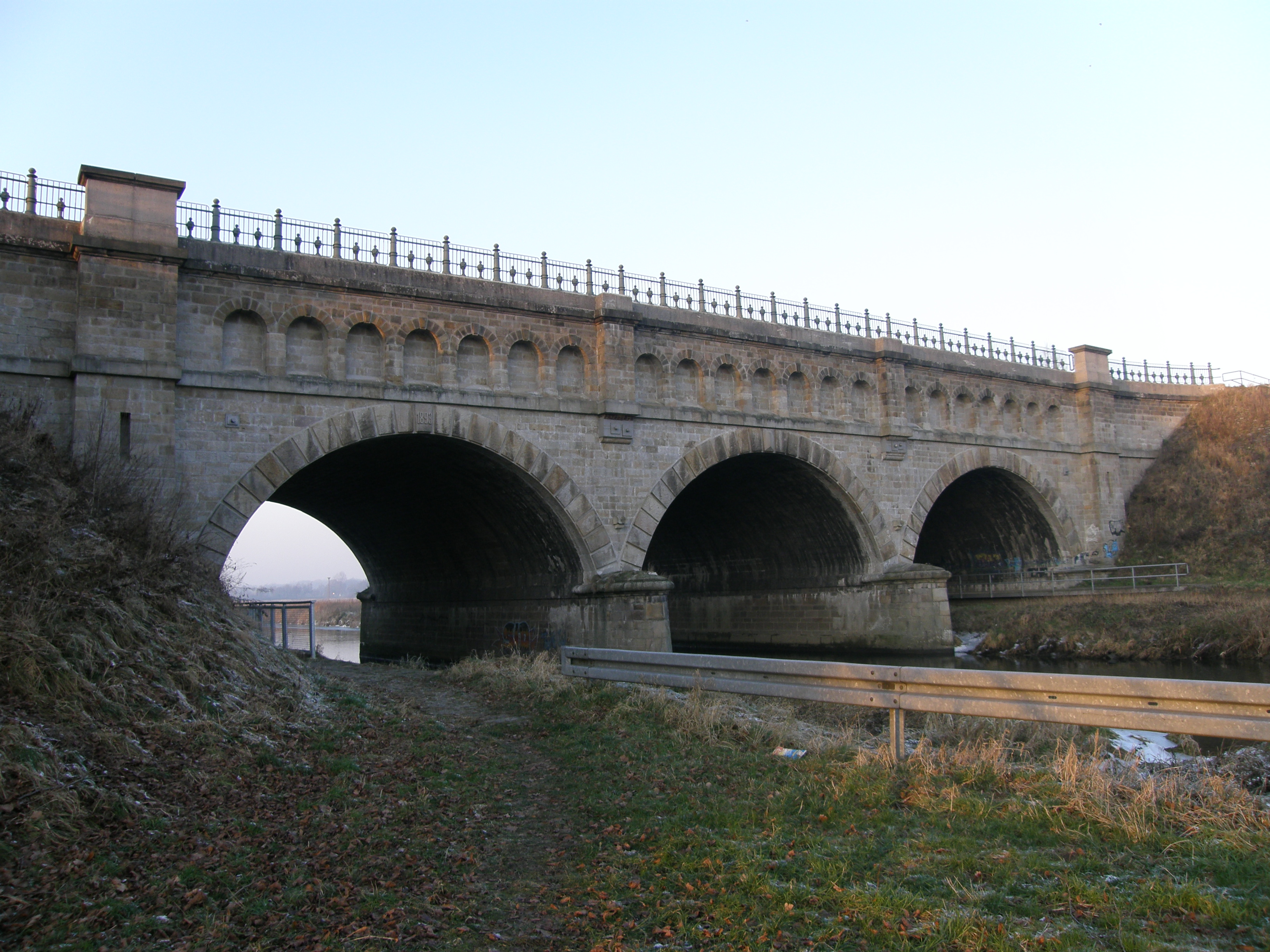 Brücke der Alten Fahrt des Dortmund-Ems-Kanals in Olfen über die Stever, Blick von Süden auf die drei Brückenbögen.